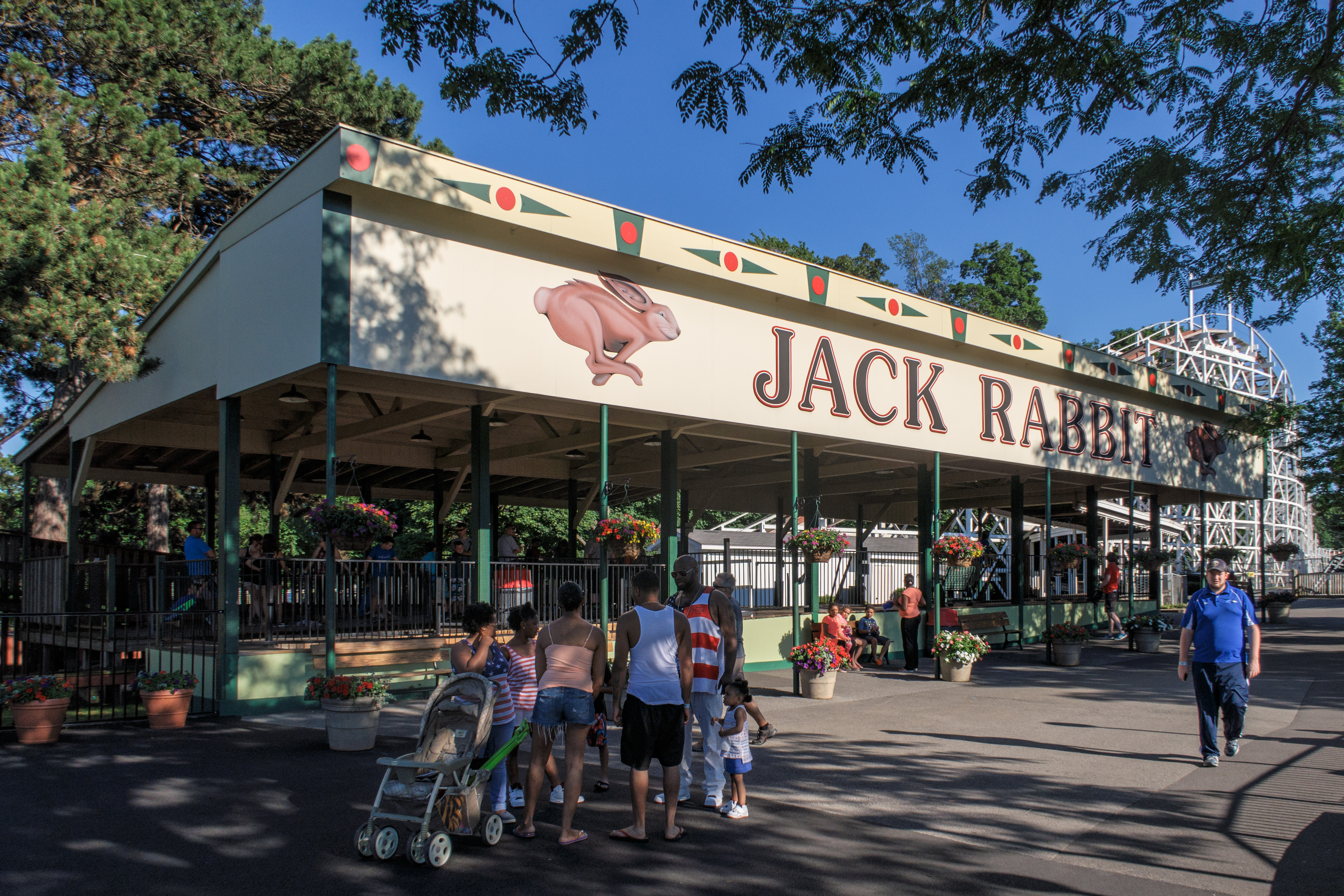 Achterbahn Jack Rabbit im Seabreeze Amusement Park, Irondequoit, New York